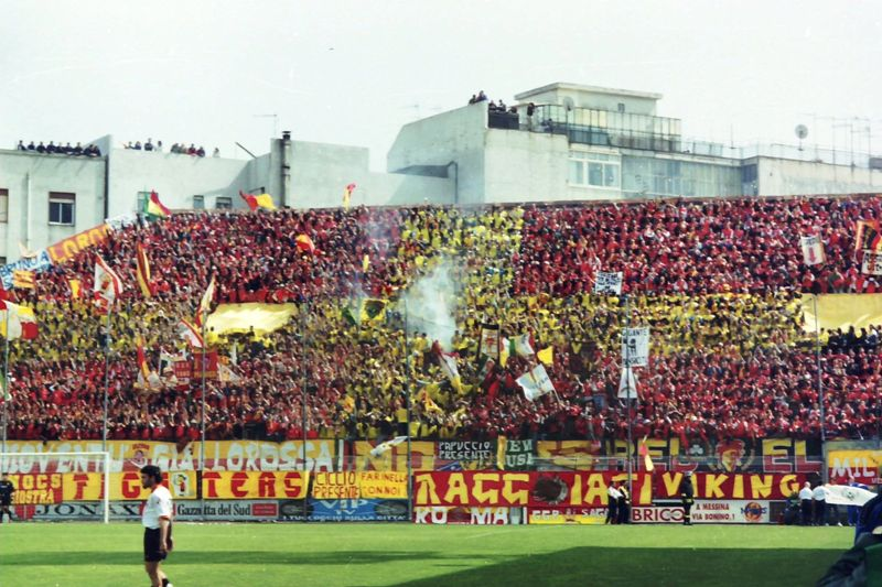 Curva sud